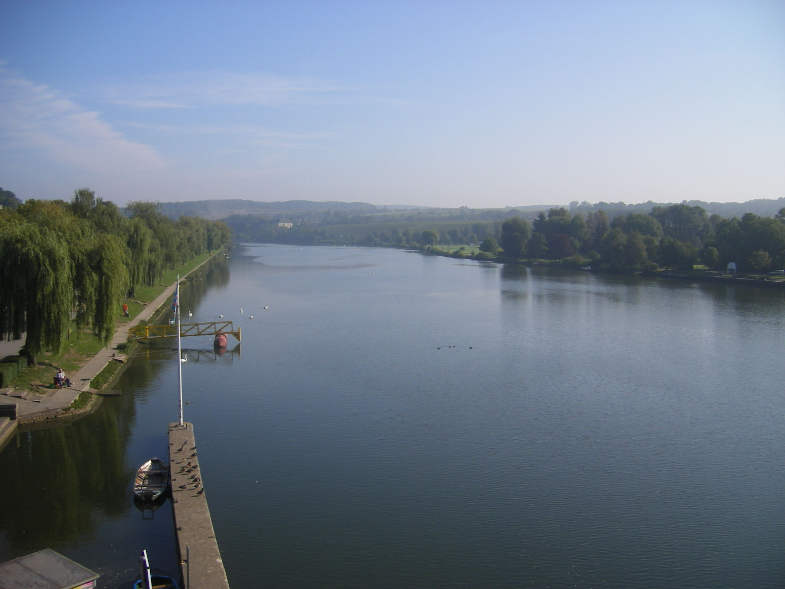 Remich - Moselle River